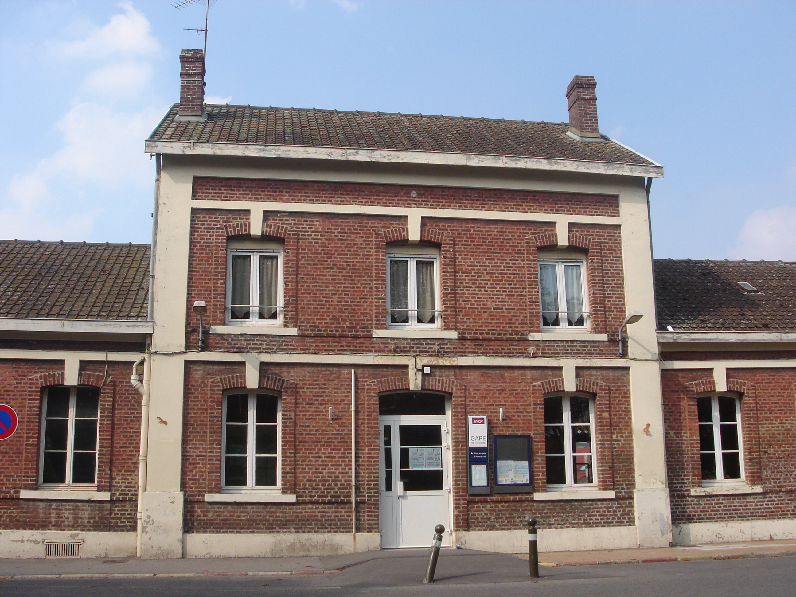 Gare de Corbie - Somme